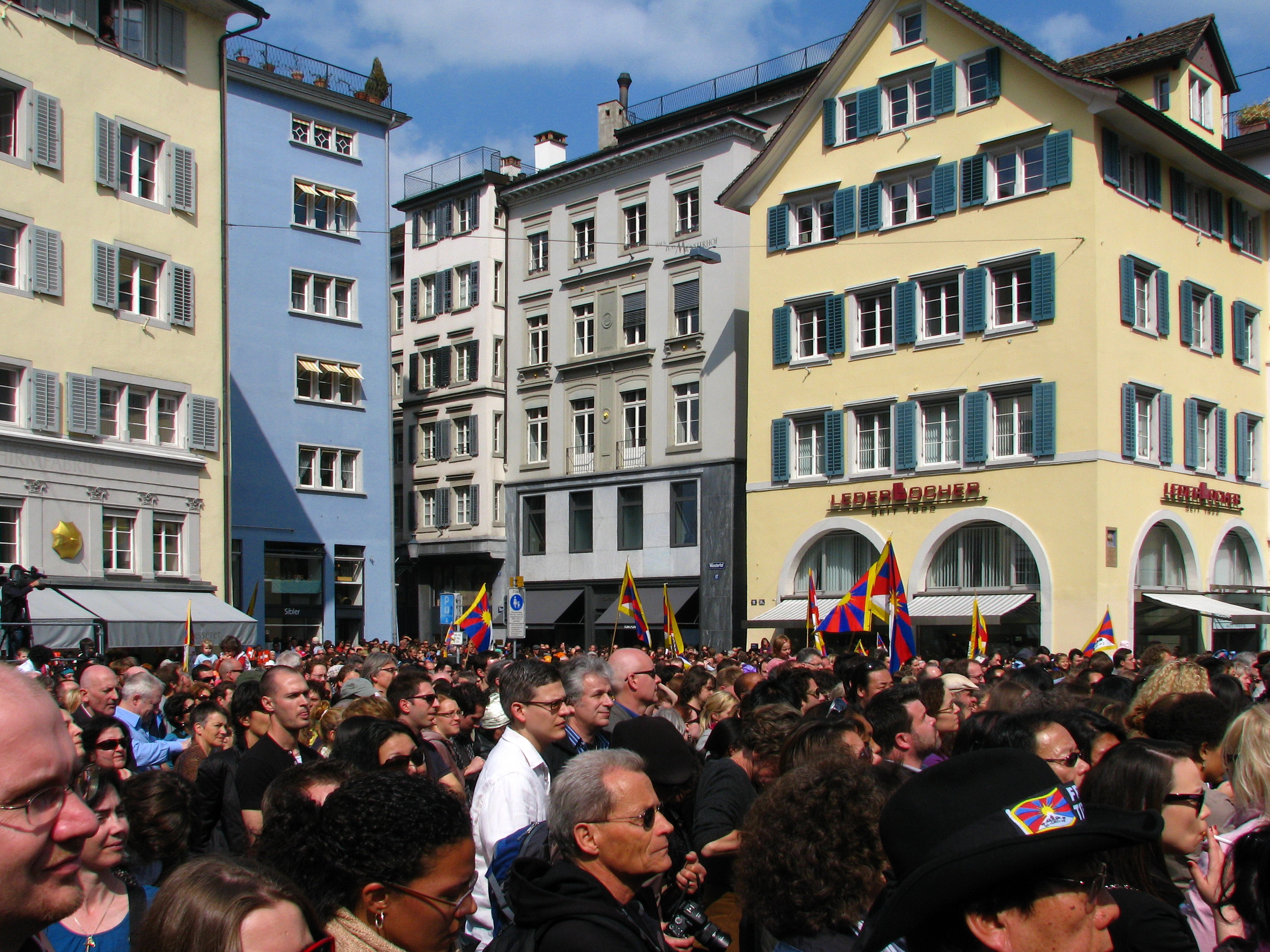 Die Schweiz für Tibet - Tibet für die Welt, Solidaritätskundgebung vom 10. April 2010, veranstaltet von der Gesellschaft Schweizerisch-Tibetische Freundschaft (GSTF) auf dem Münsterhof in Zürich.